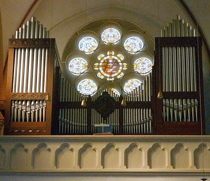 Hugo-Mayer-Orgel in der Missionshauskirche St. Wendel